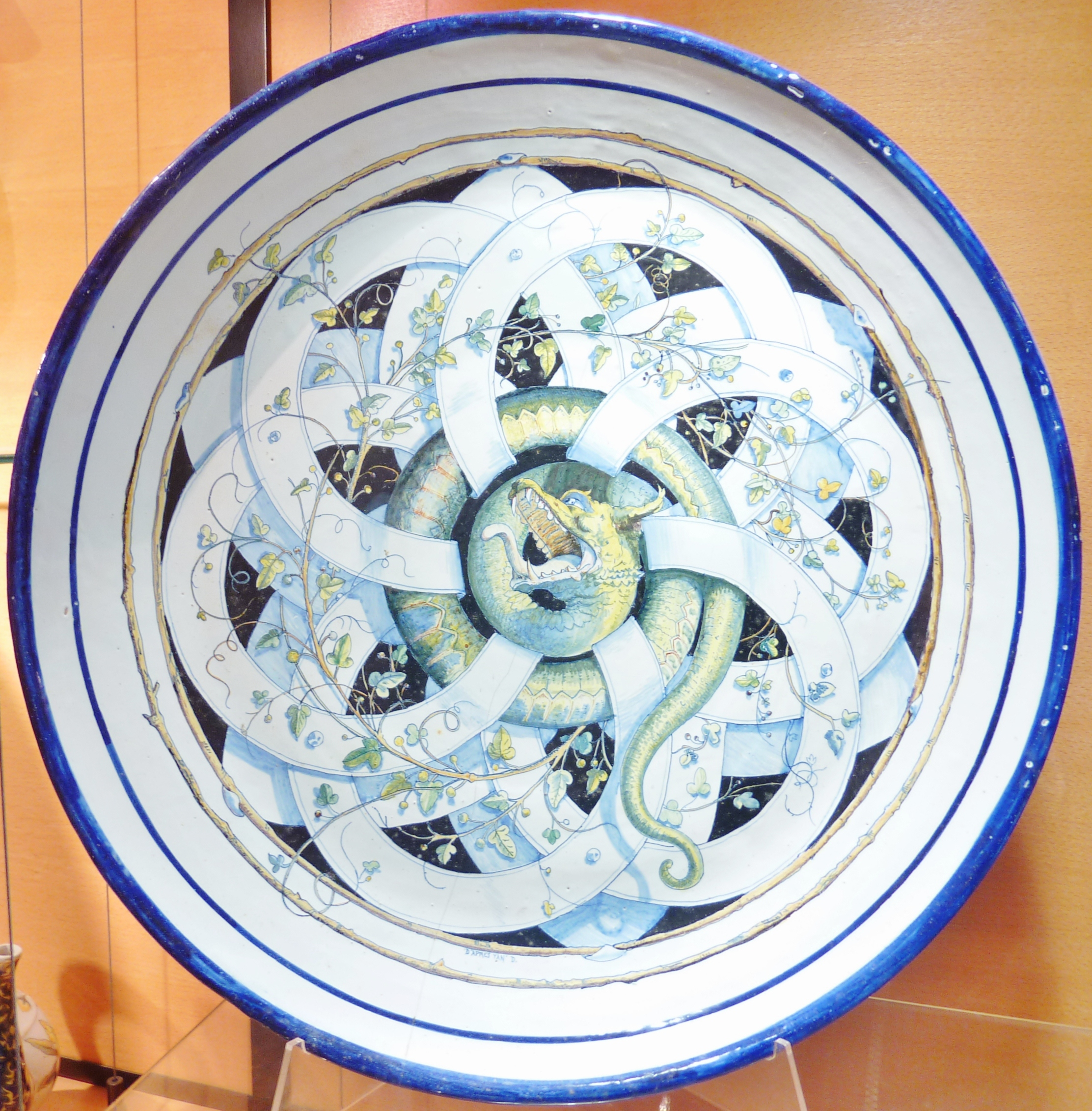 Faïence de Quimper : assiette "Décor aux serpents", inspiré d'un dessin de Yan Dargent, manufacture HB (Musée de la faïence de Quimper)